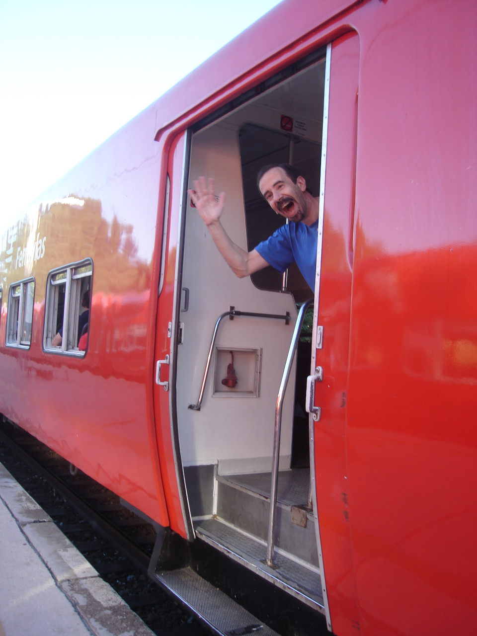 El usuario Roberto Fiadone saludando desde un coche del Ferrocarril General Belgrano de la red ferroviaria argentina.